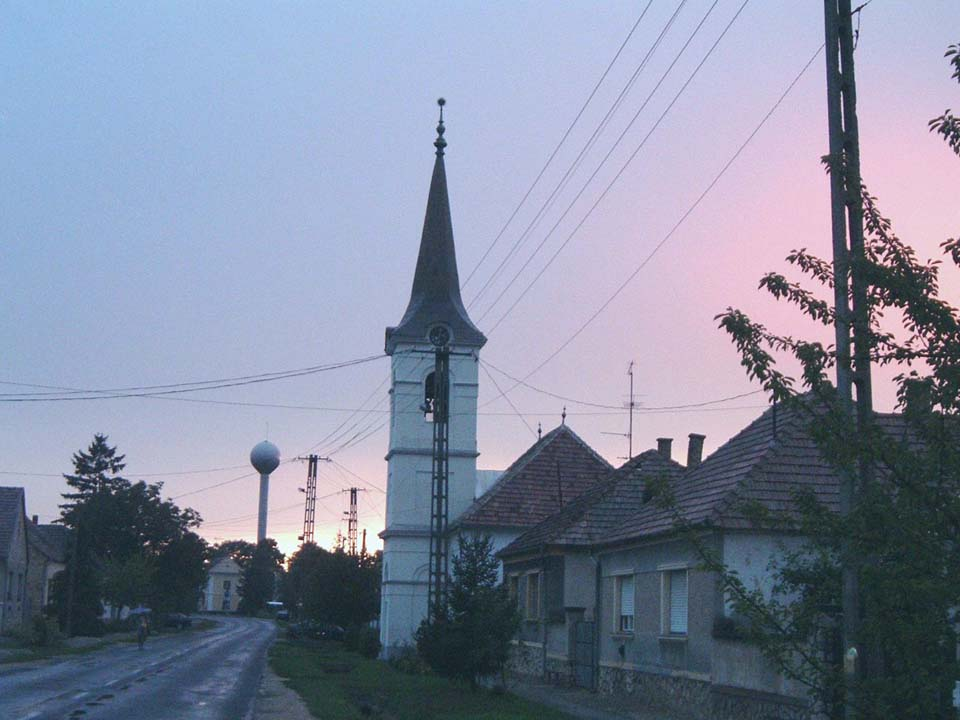 Dáka, Hungary